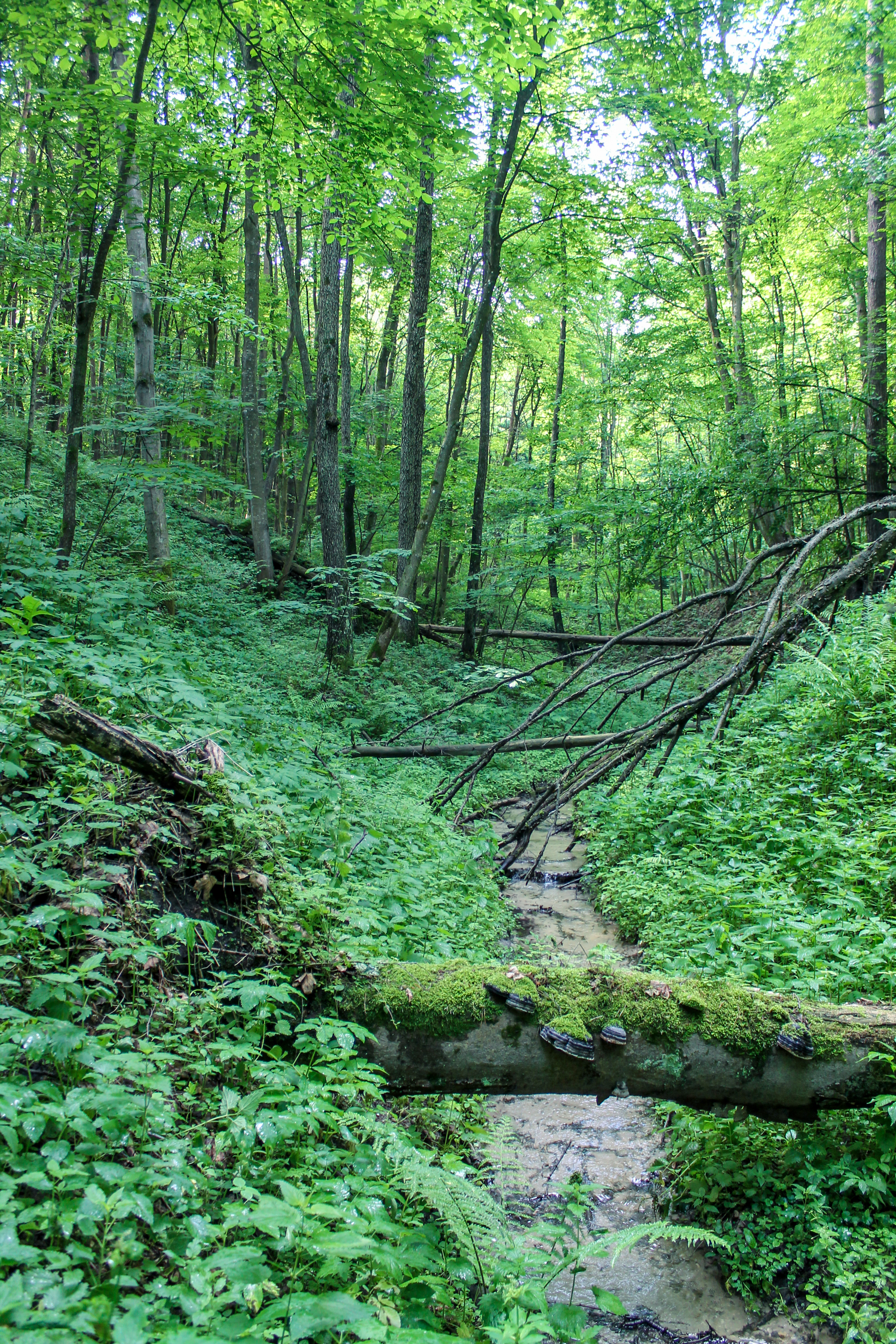 Урочище «Пекло», Здолбунівський район Мостівське л-во: кв. 74 вид. 2, 11, 15, 16, 23-25; кв. 76, вид. 10, 12, 13, 22, 23, 27